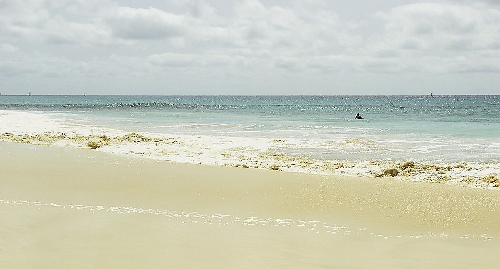 Plage de Santa Maria sur l'île de Sal au Cap-Vert